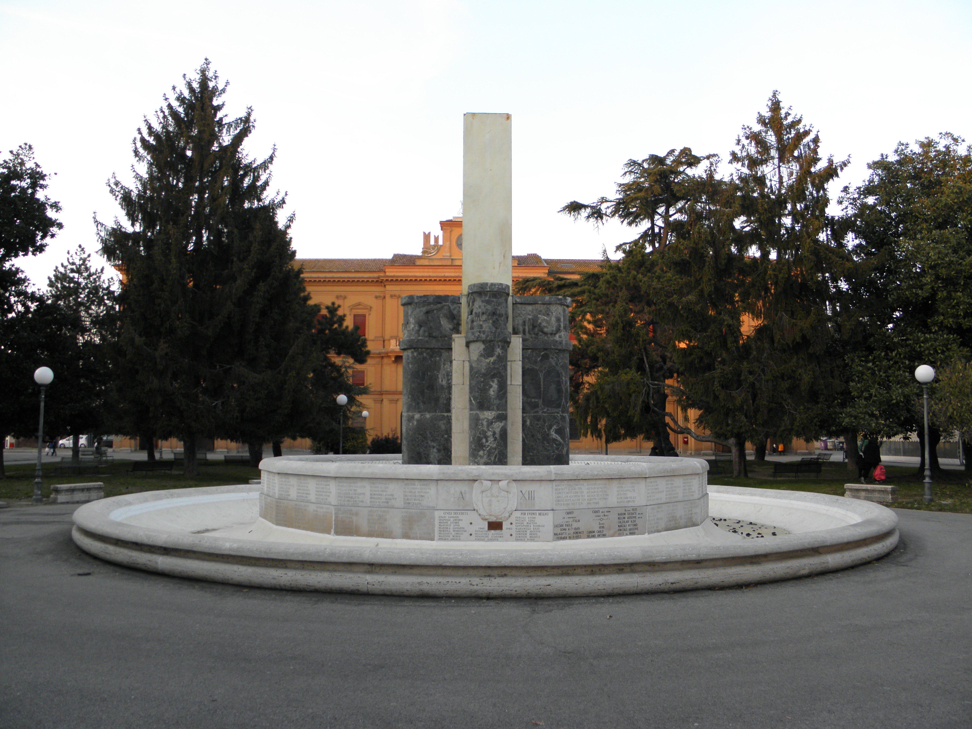 Copparo, Piazzetta Mosè Tomasatti: la Fontana Monumentale dedicata ai concittadini caduti durante la prima guerra mondiale.